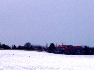 Eschenrode